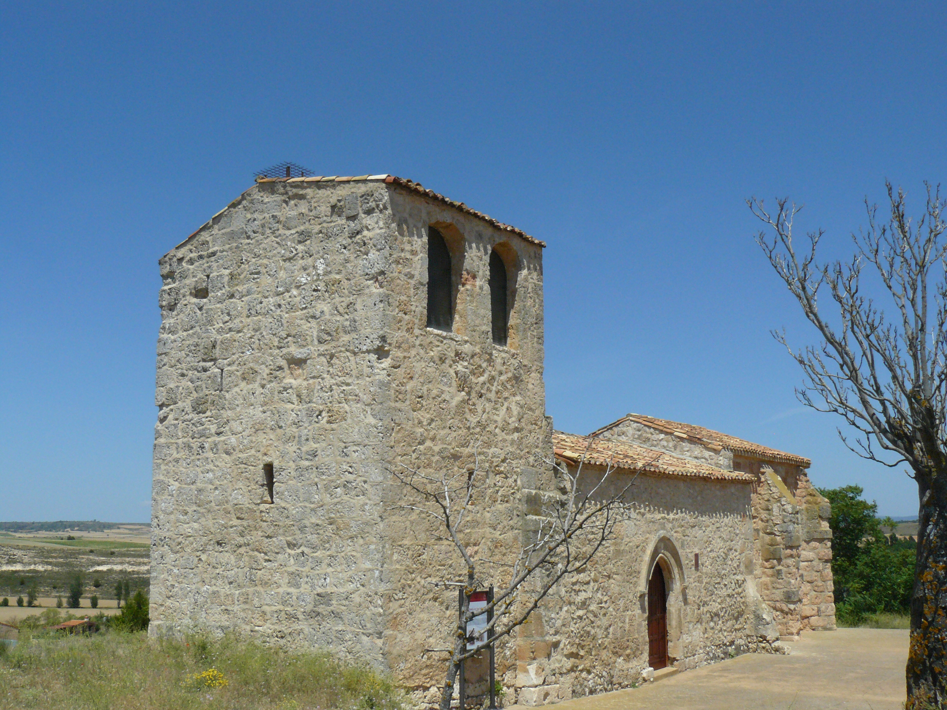 Arandilla, Burgos.